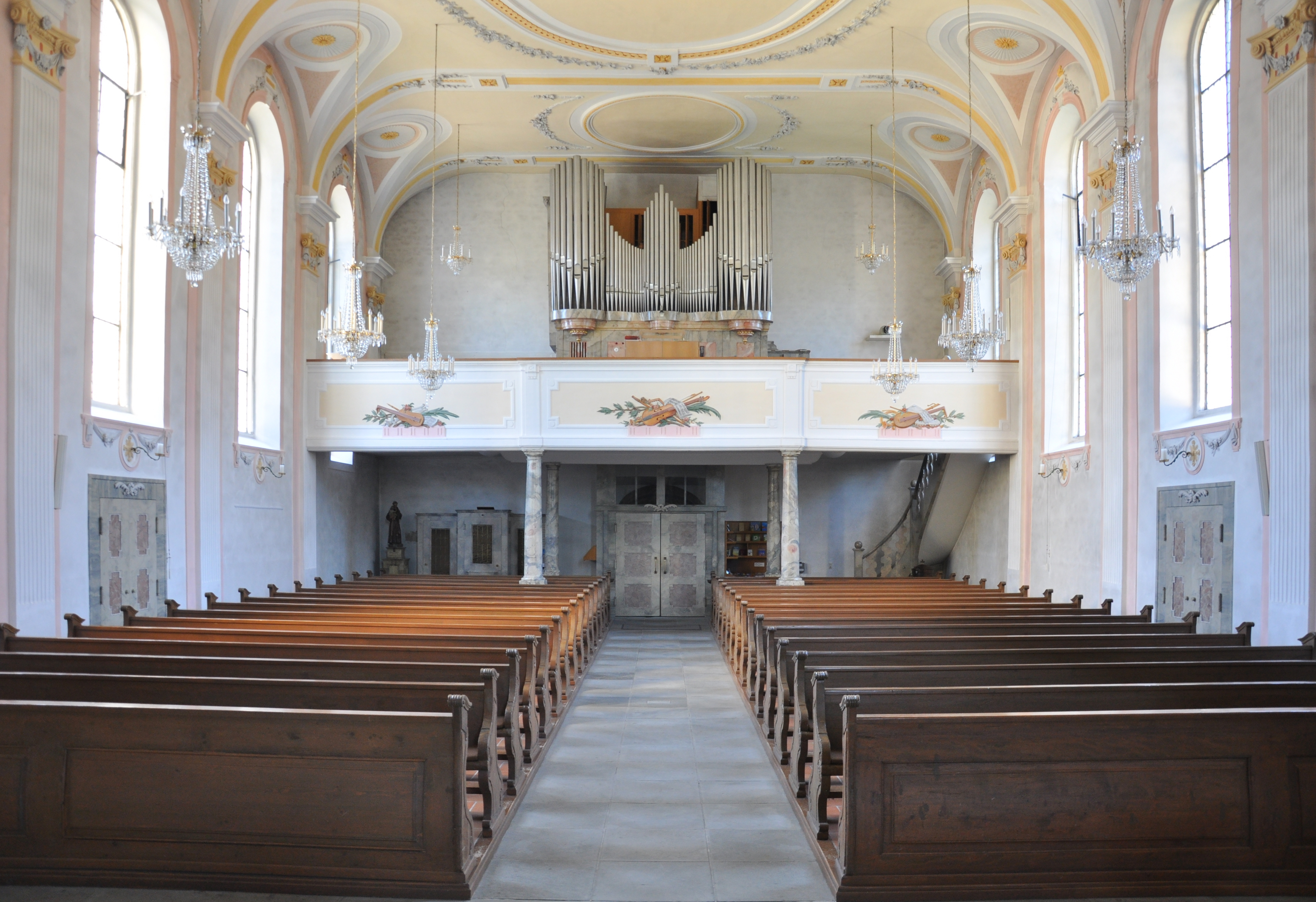 Stühlingen, Landkreis Waldshut, Heilig-Kreuz-Kirche Blick zur Orgel